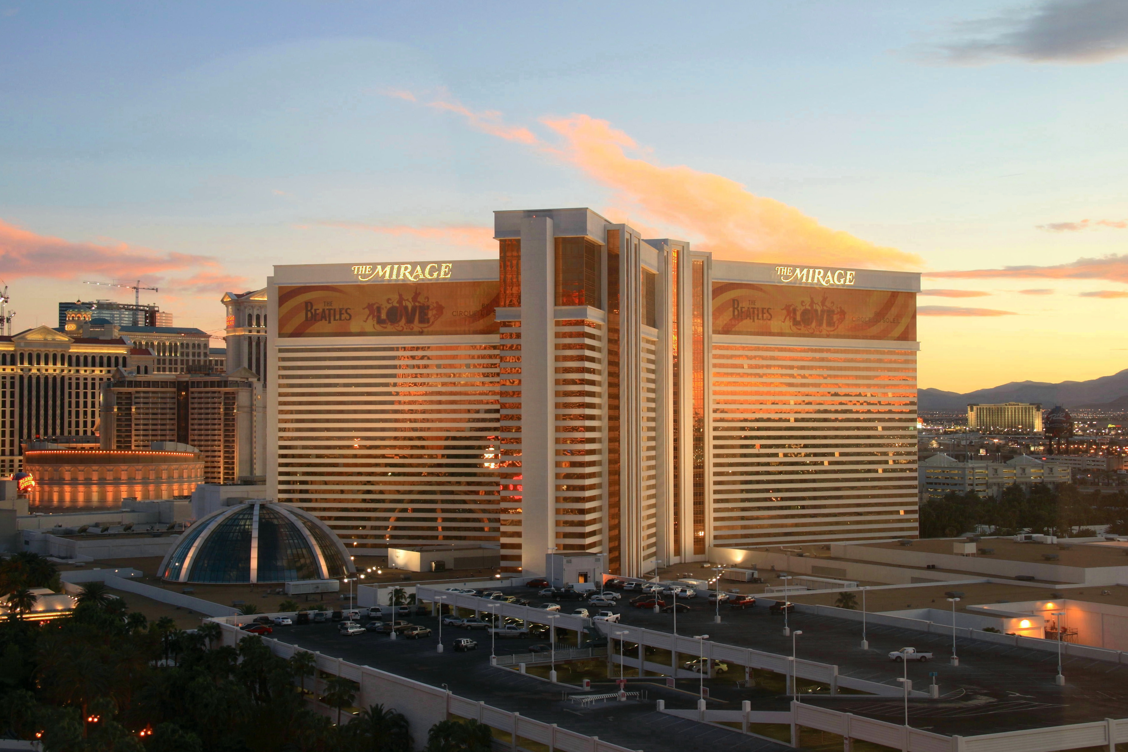 Das Mirage Hotel & Casino vom Treasure Island aus gesehen